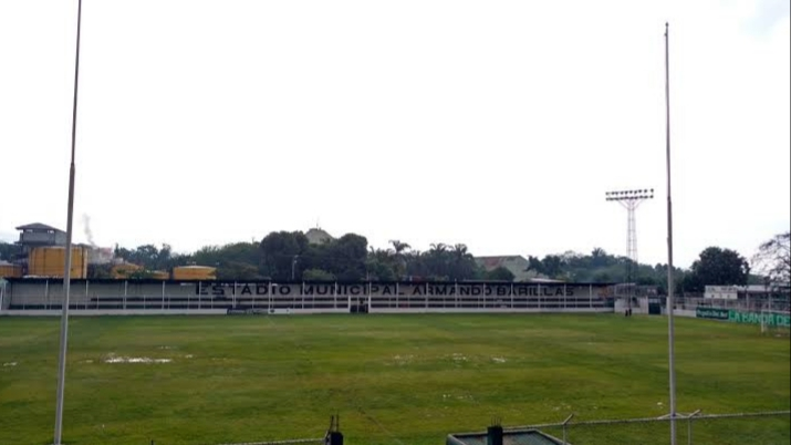 Recinto de fútbol ubicado en Escuintla, Guatemala. Con capacidad para 7500 espectadores.